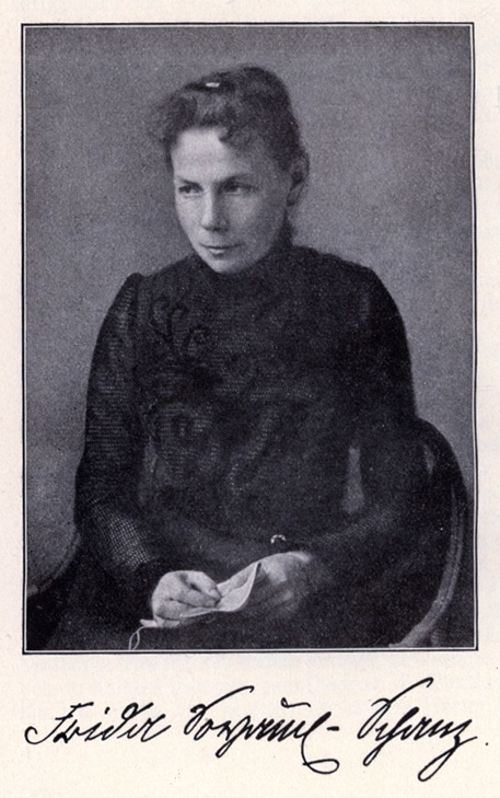 Frida Soyaux-Schanz Porträt mit Signum